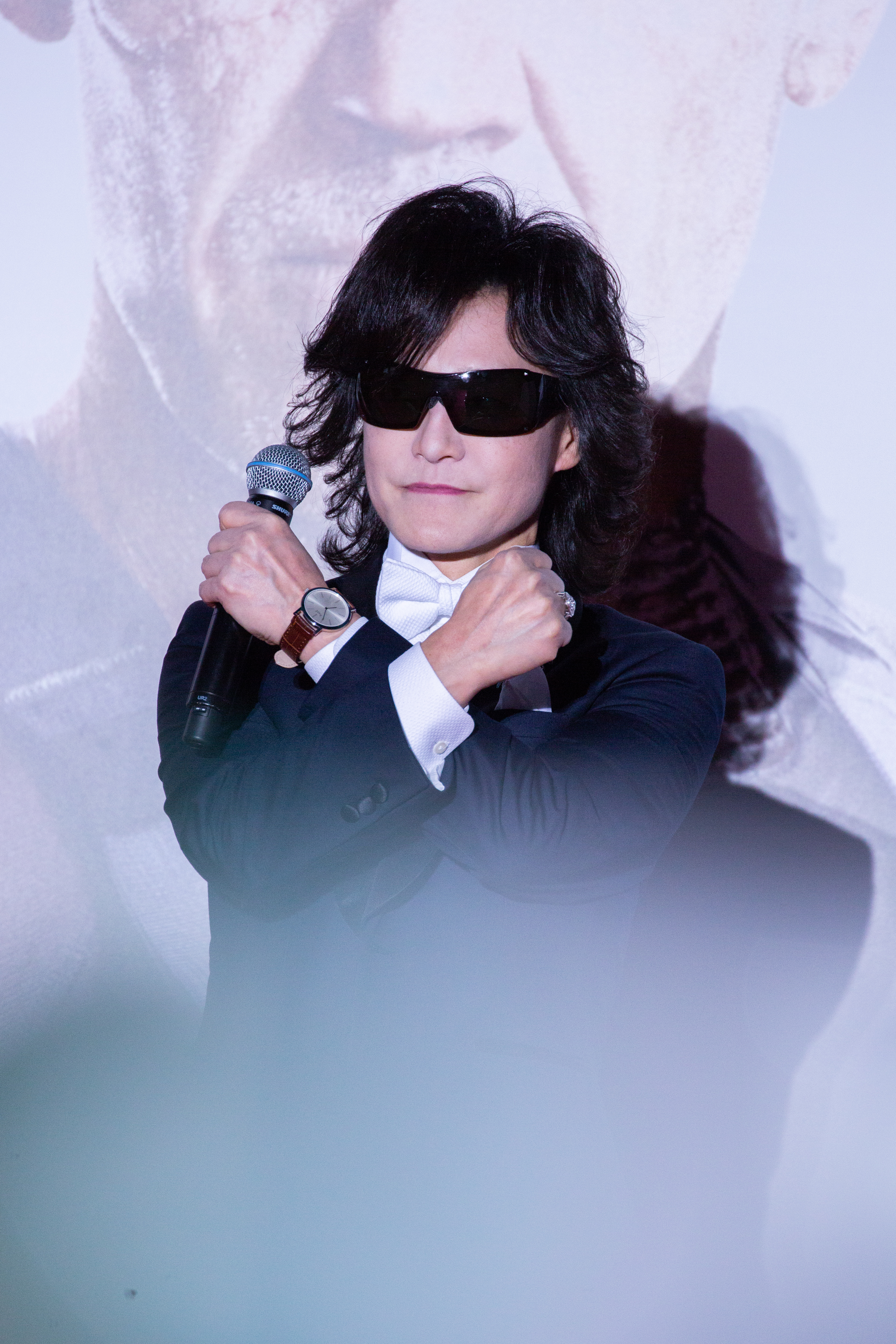 デッドプール2 ジャパン・プレミア レッドカーペット Toshl